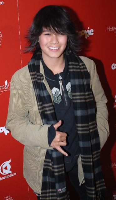 Singer Boo Boo Stewart